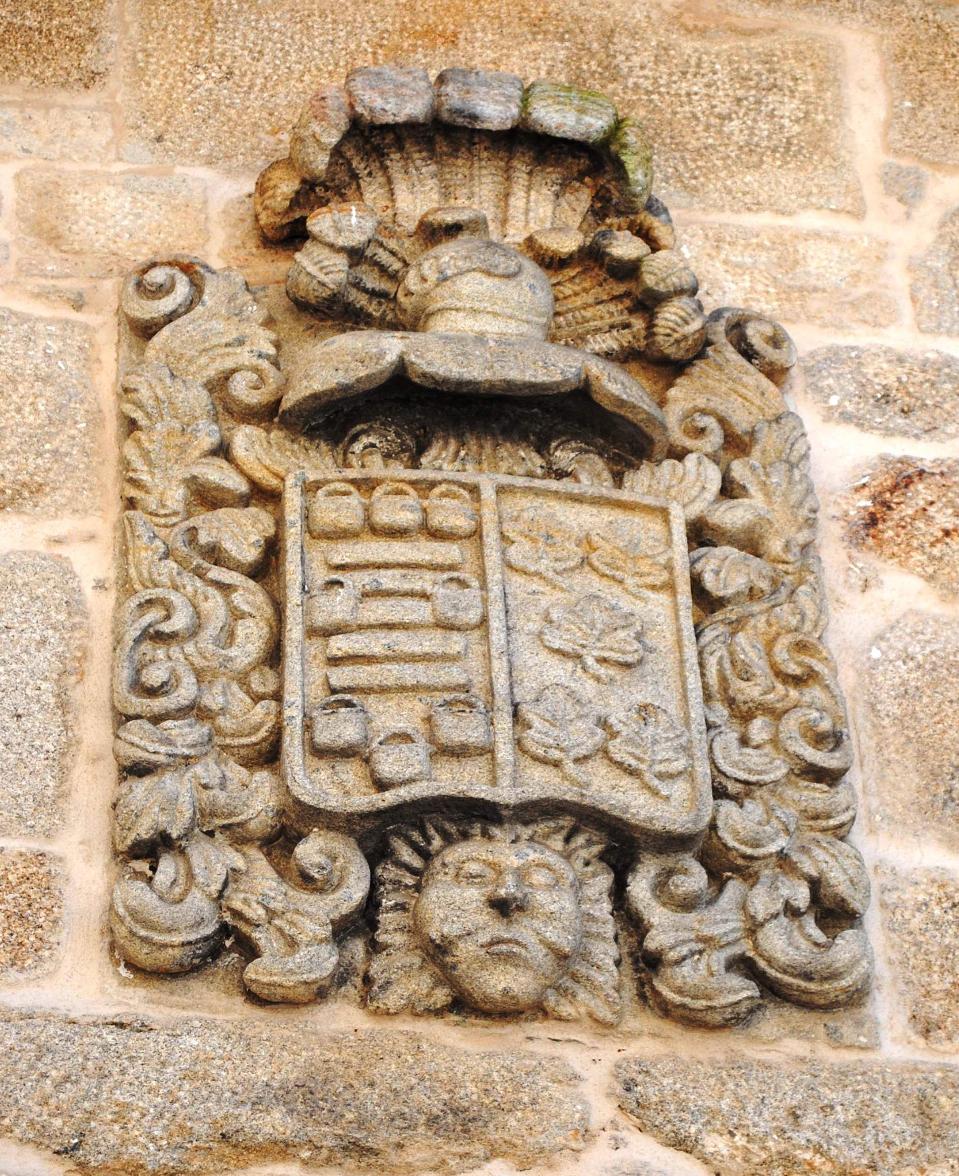 Vexa o título e as categorías.